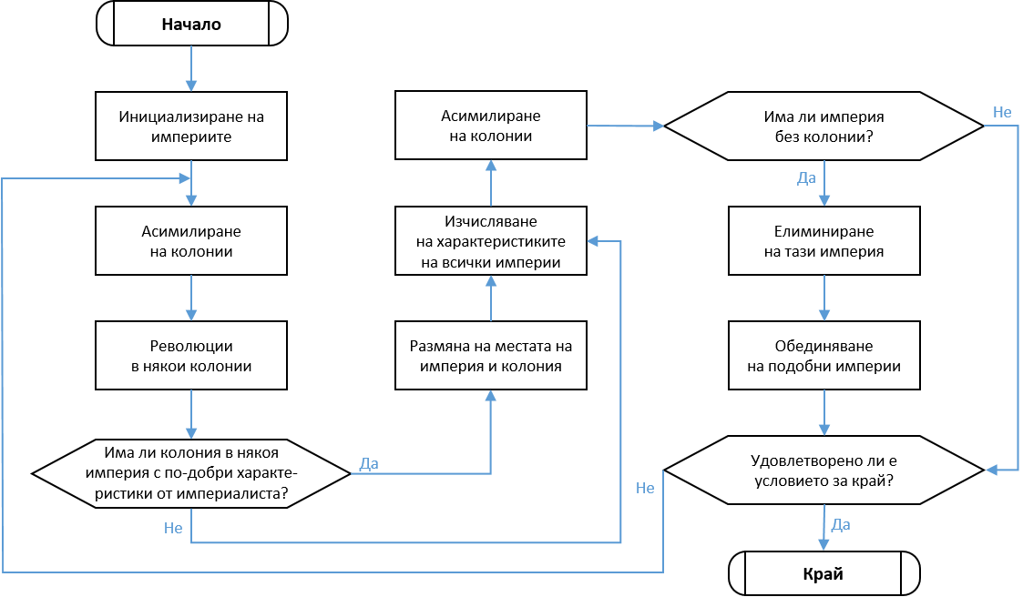 Илюстрация към Алгоритъм на империалистическата конкуренция с текстове на български